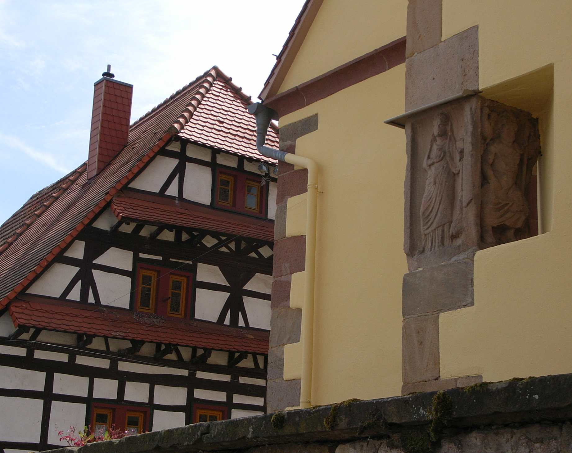 römischer Viergötterstein an der Dorfkirche in Nußdorf (Landau), sichtbar die Göttin Juno und Jupiter; im Hintergrund das Bauernkriegshaus